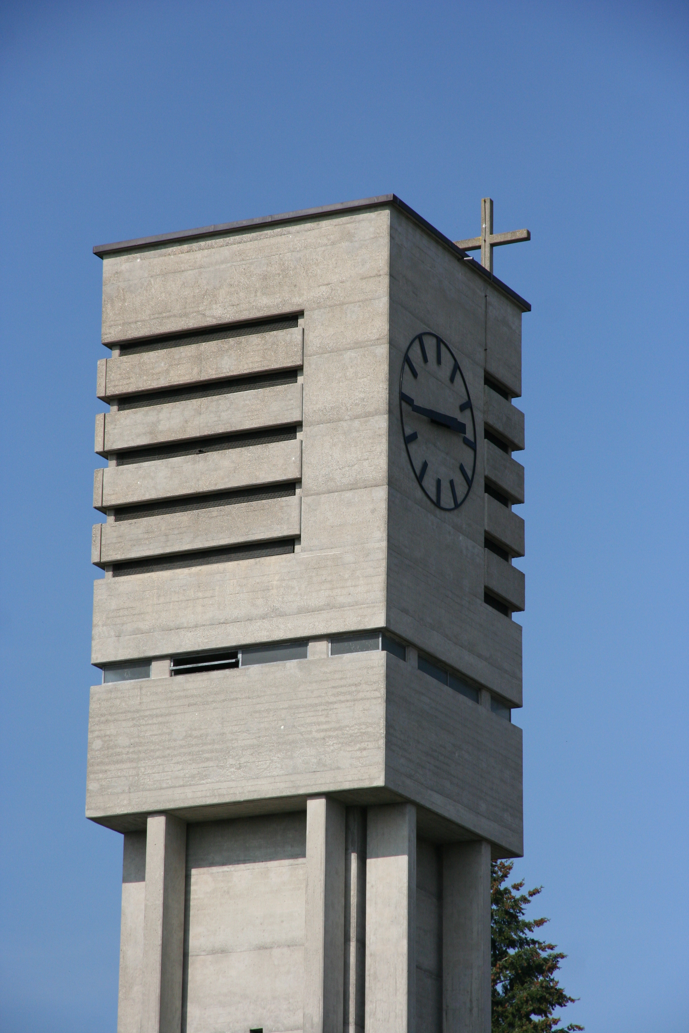 Römisch-katholische Kirche Bruder Klaus Diessenhofen TG